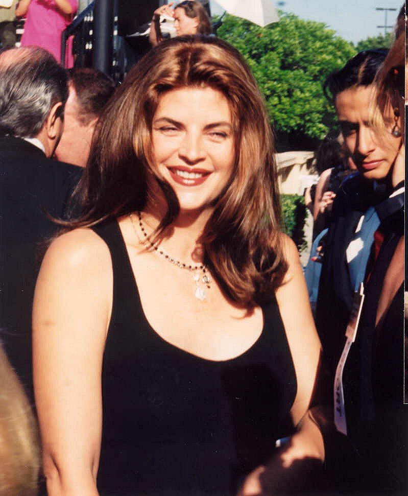 Kirstie Alley, 1994